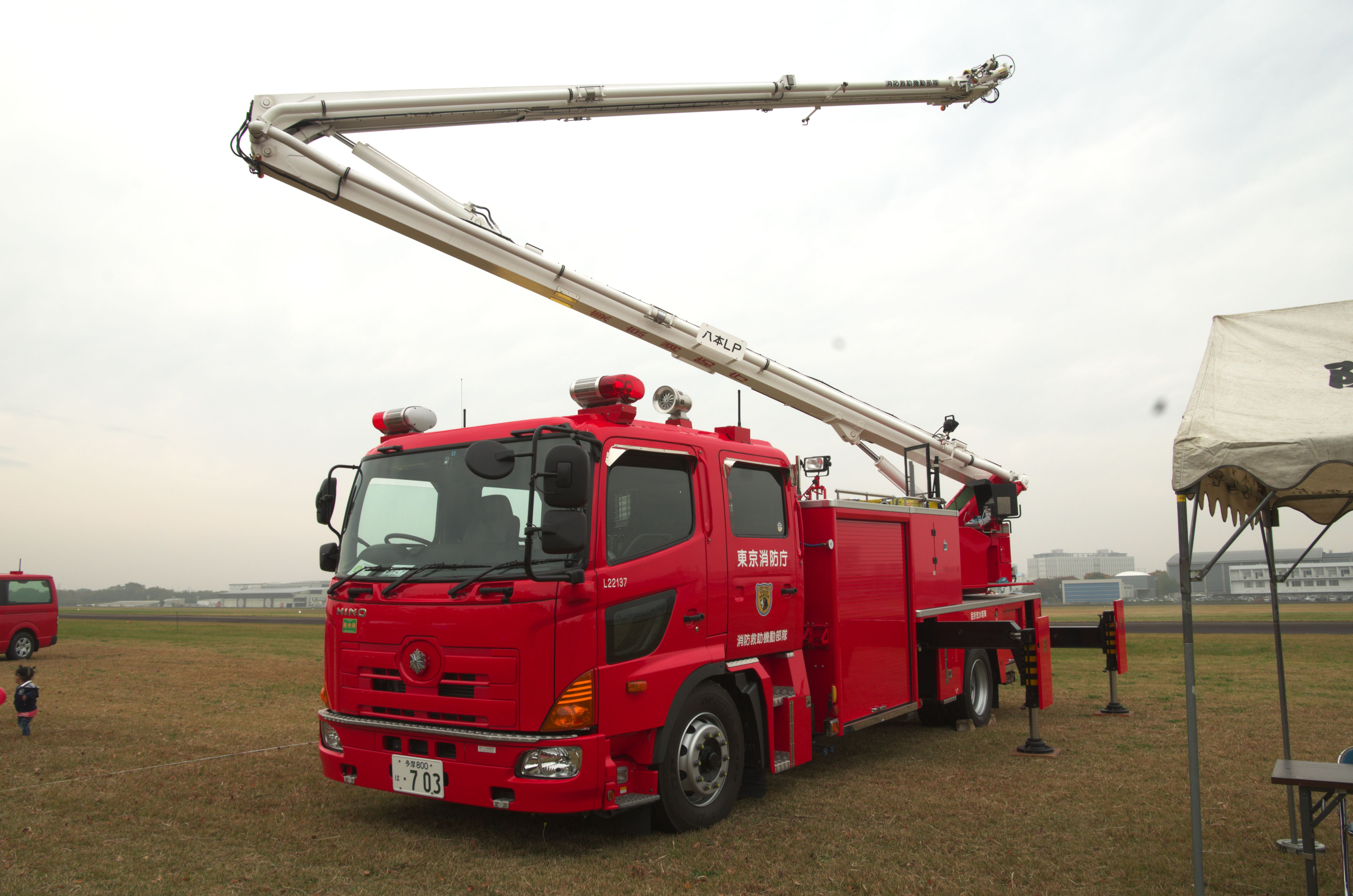 陸上自衛隊 東京消防庁 警視庁 立川防災航空祭 2013